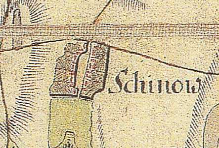 Schünow auf der Schmettau'schen Karte von 1767-87, Schünow, Stadt Zossen, Brandenburg, Deutschland